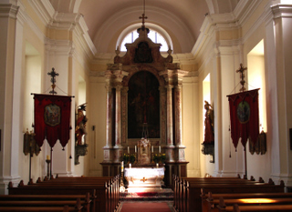 Blick in das Langhaus. Altar.